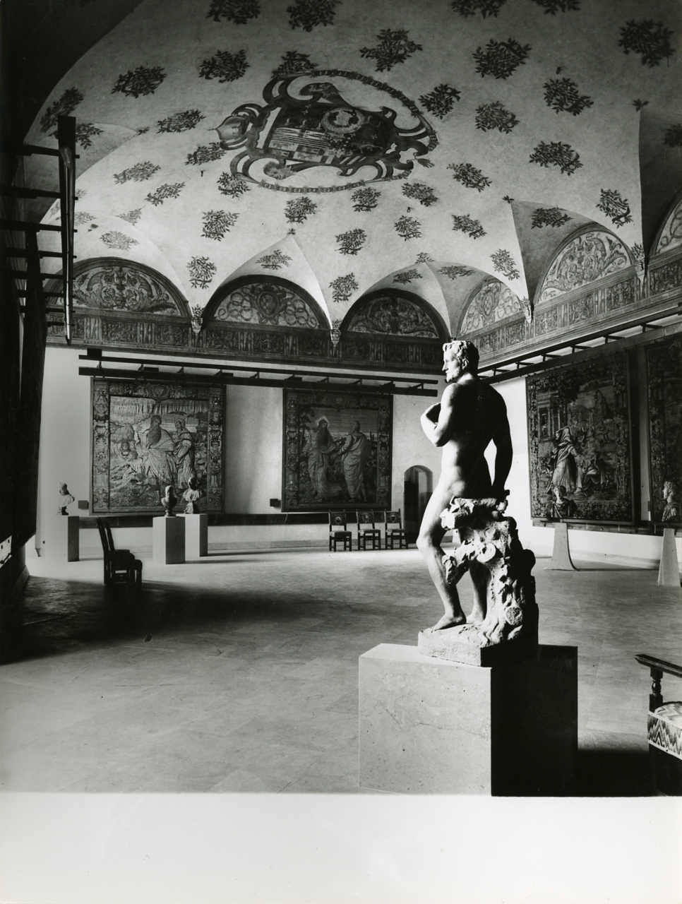 Servizio fotografico : Milano, 1956 / Paolo Monti. - Stampe: 2 : Positivo b/n, gelatina bromuro d'argento/ carta, 18x24. - ((Al verso delle stampe manoscritti i numeri dei negativi corrispondenti secondo altra numerazione: 51, 75. - Timbro a inchiostro con copyright: "Foto Fotogramma s.r.l./ [...] Via V. Colonna [...]/ Milano". - Sul coperchio della scatola iscrizione didascalica manoscritta a pennarello nero: "Milano". - Occasione: Documentazione del riordino e sistemazione dei Musei del Castello e per la pubblicazione: Belgiojso L., Peressutti E., Rogers E.N., "Il riordino dei Musei del Castello Sforzesco di Milano", in "Casabella", n. 211, 1956. - Fonte: Rubrica di Paolo Monti: Archivio 10x12 (ultimi numerati) - dal G1 al (s.d.), presso Archivio Paolo Monti. - Fonte: Monografia di Belgiojoso L. Peressutti E., Rogers E.N.: Il riordino dei Musei del Castello Sforzesco di Milano, in Casabella, n. 211 (1956)